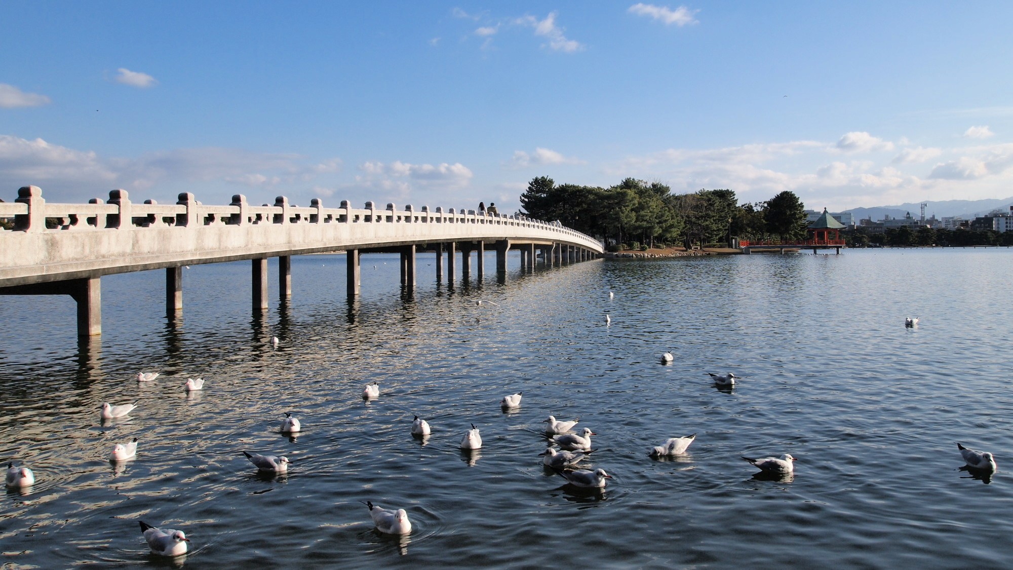 福岡市中央区の大濠公園に架かる観月橋